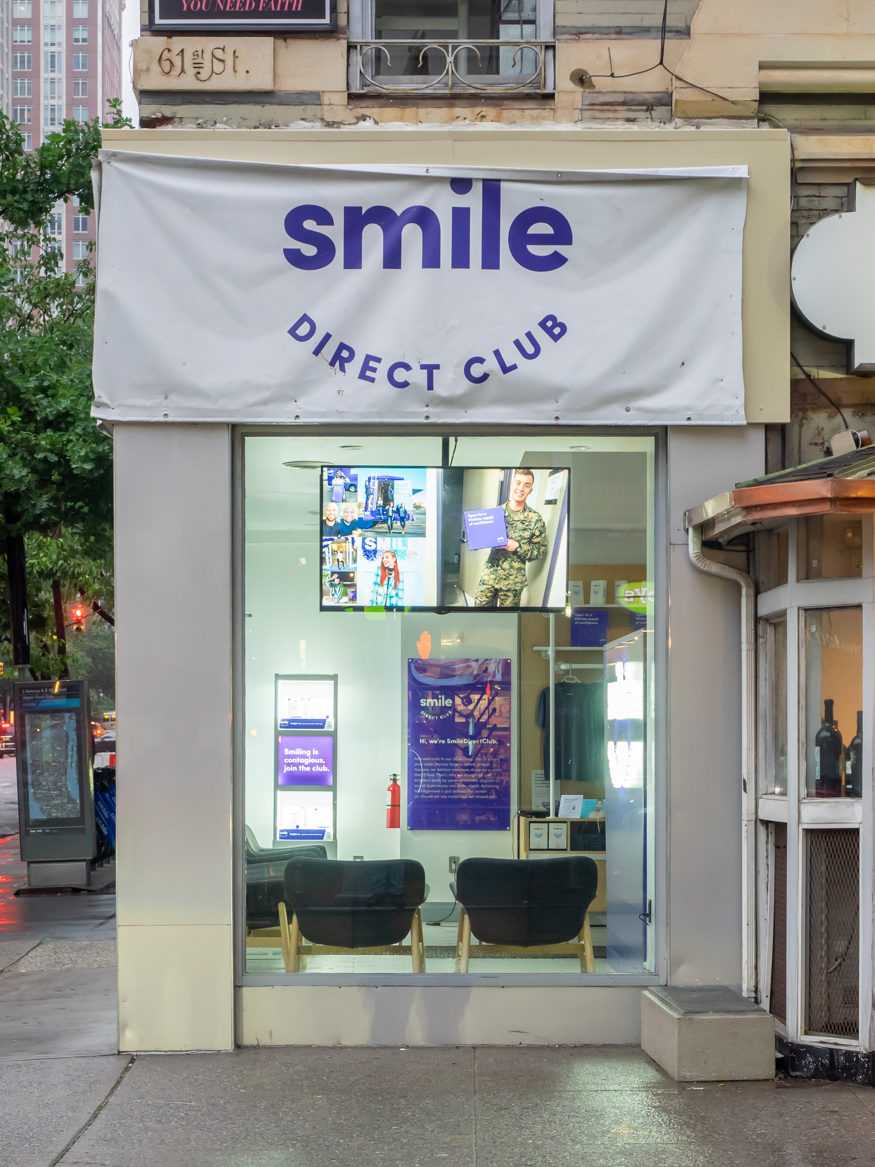 Upper East Side, NYC